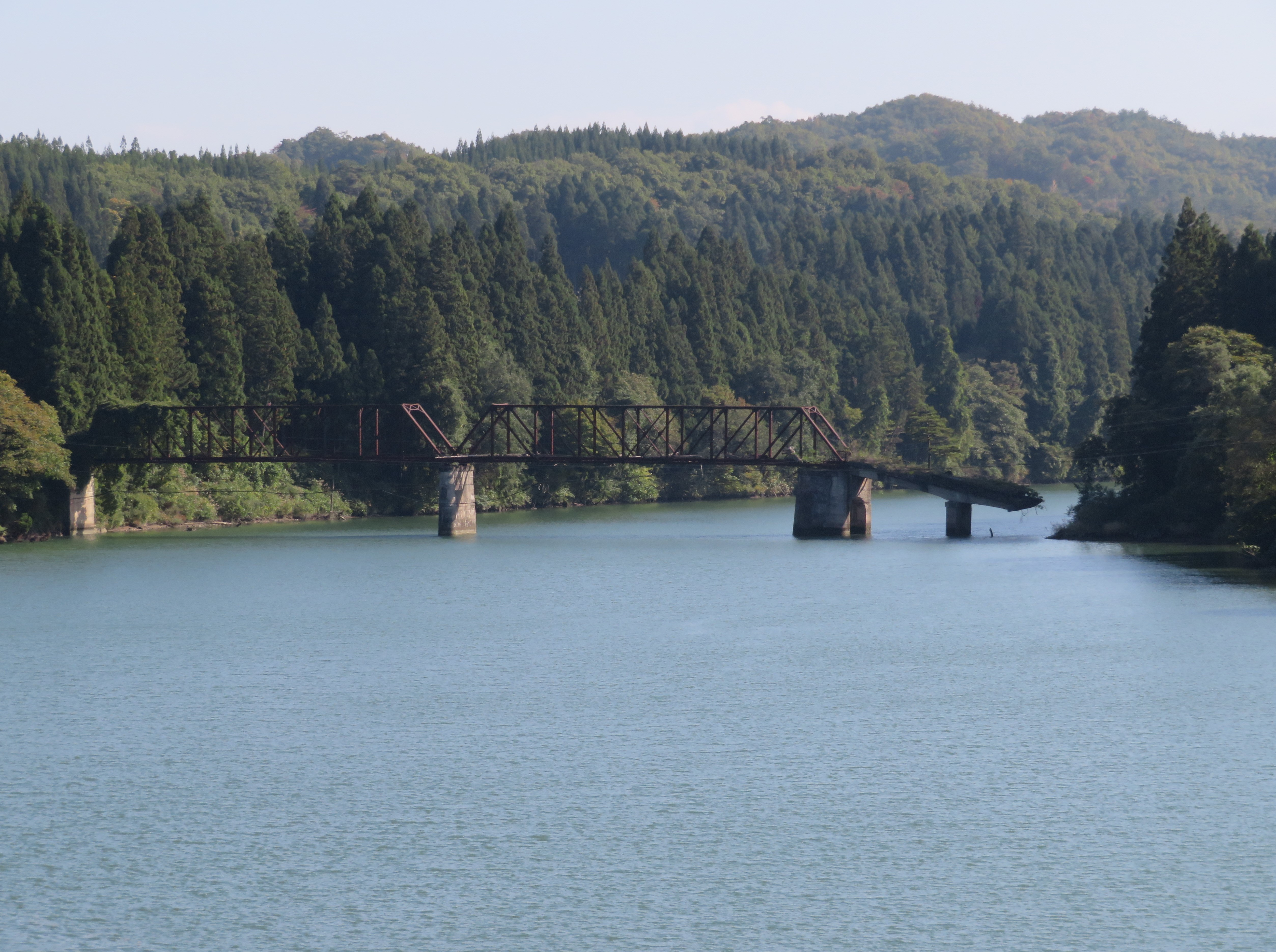 福島県耶麻郡西会津町の阿賀川に架かっている旧柴崎橋 Canon PowerShot SX720 HS